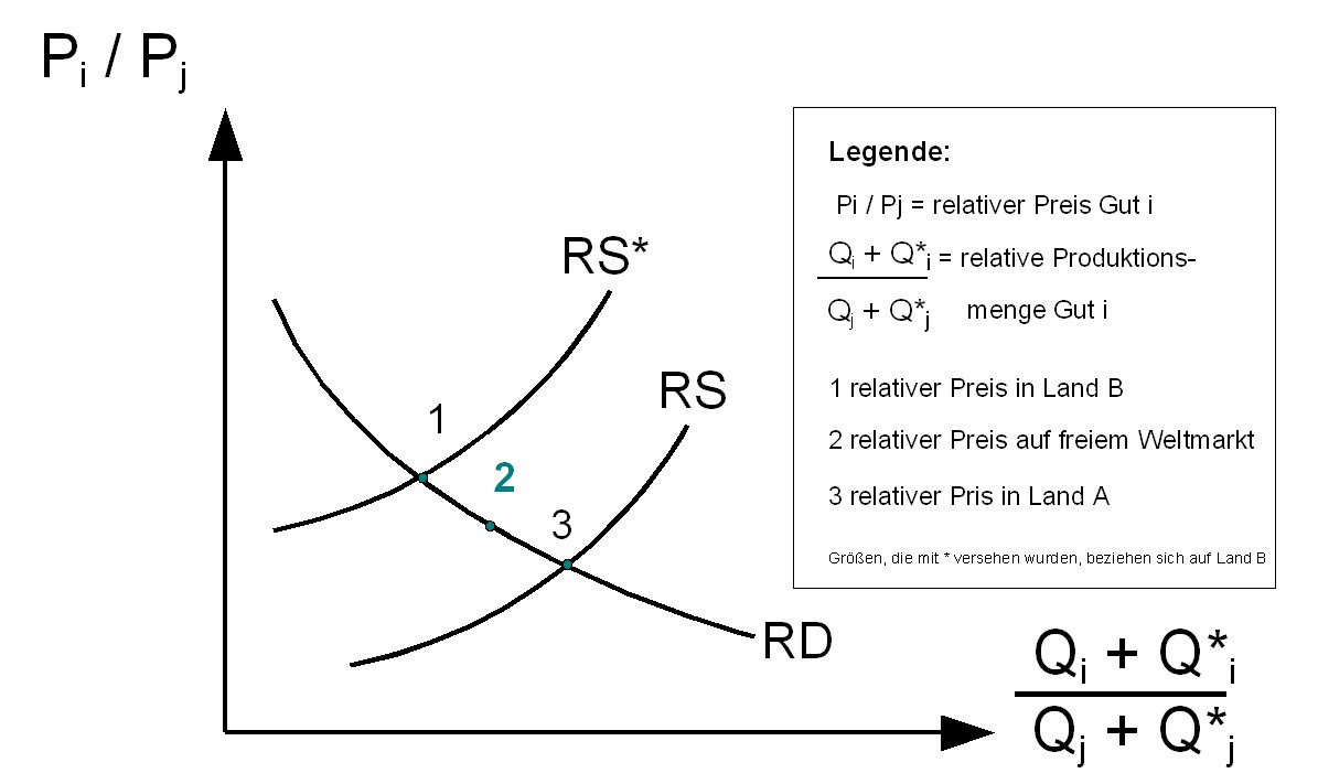 Der Gütermarkt bei freiem Welthandel in relativen Preisen/Mengen